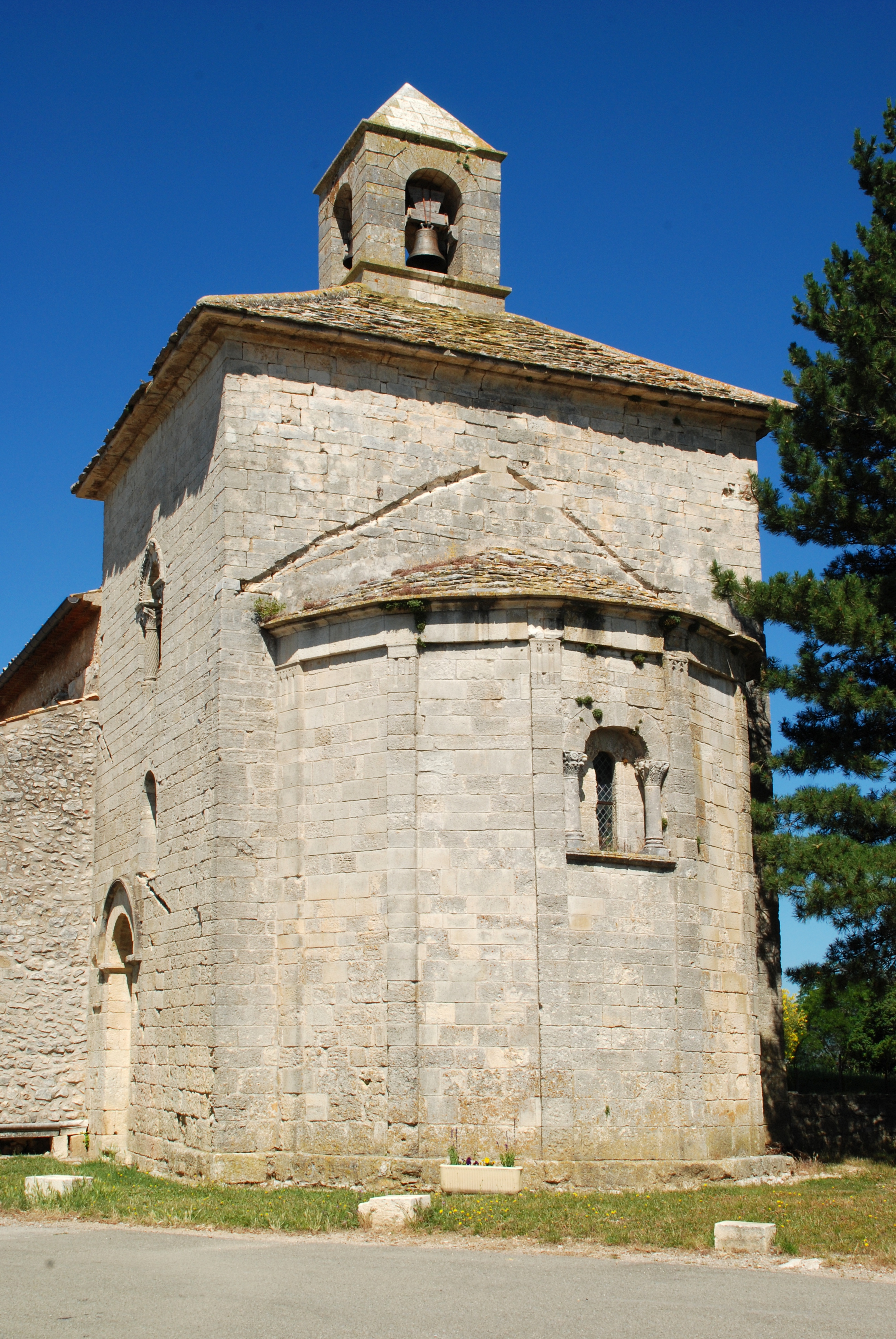 France - Provence - Église de Saint-Trinit